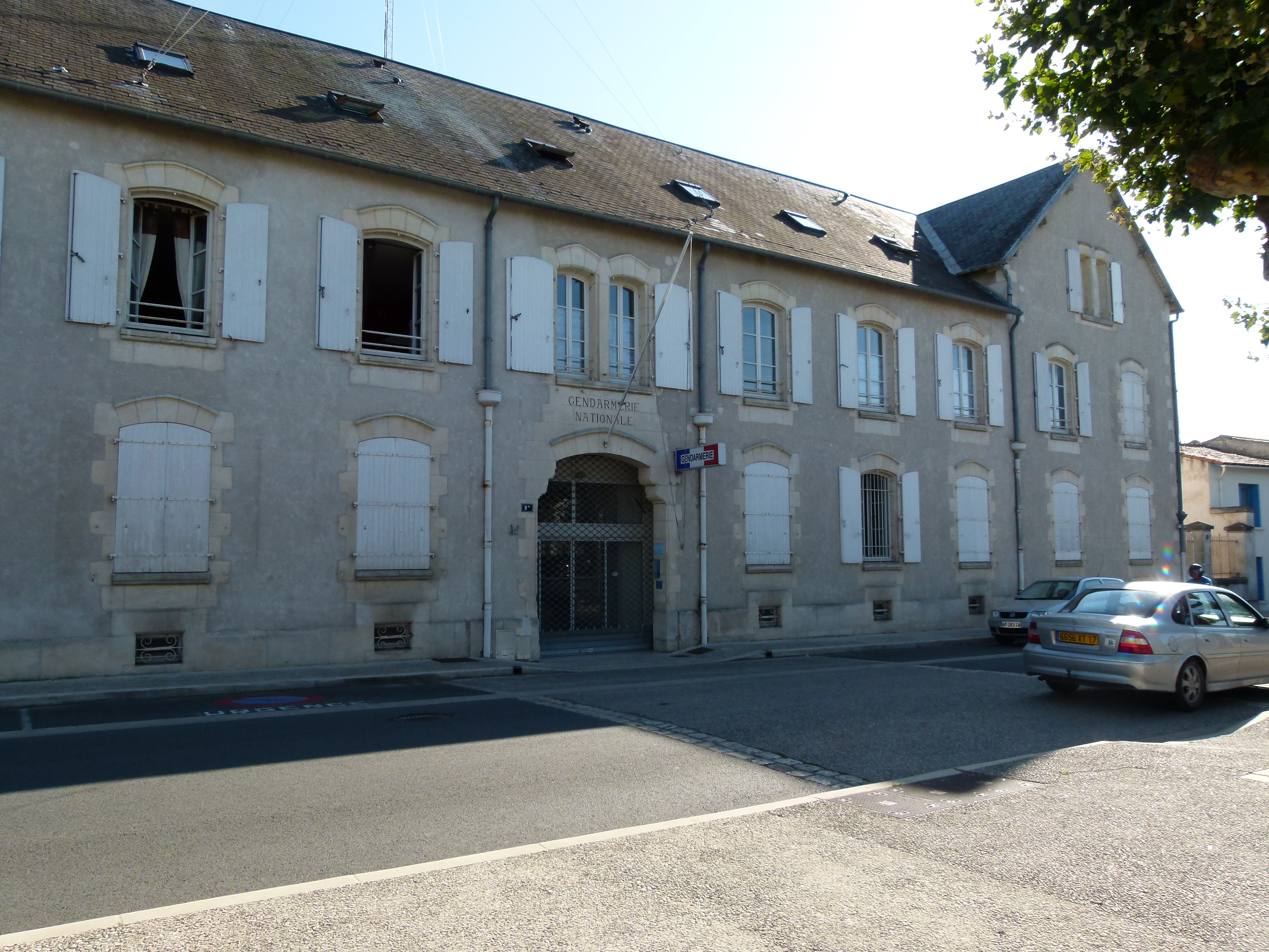 La caserne de la Gendarmerie nationale de Marennes (17)